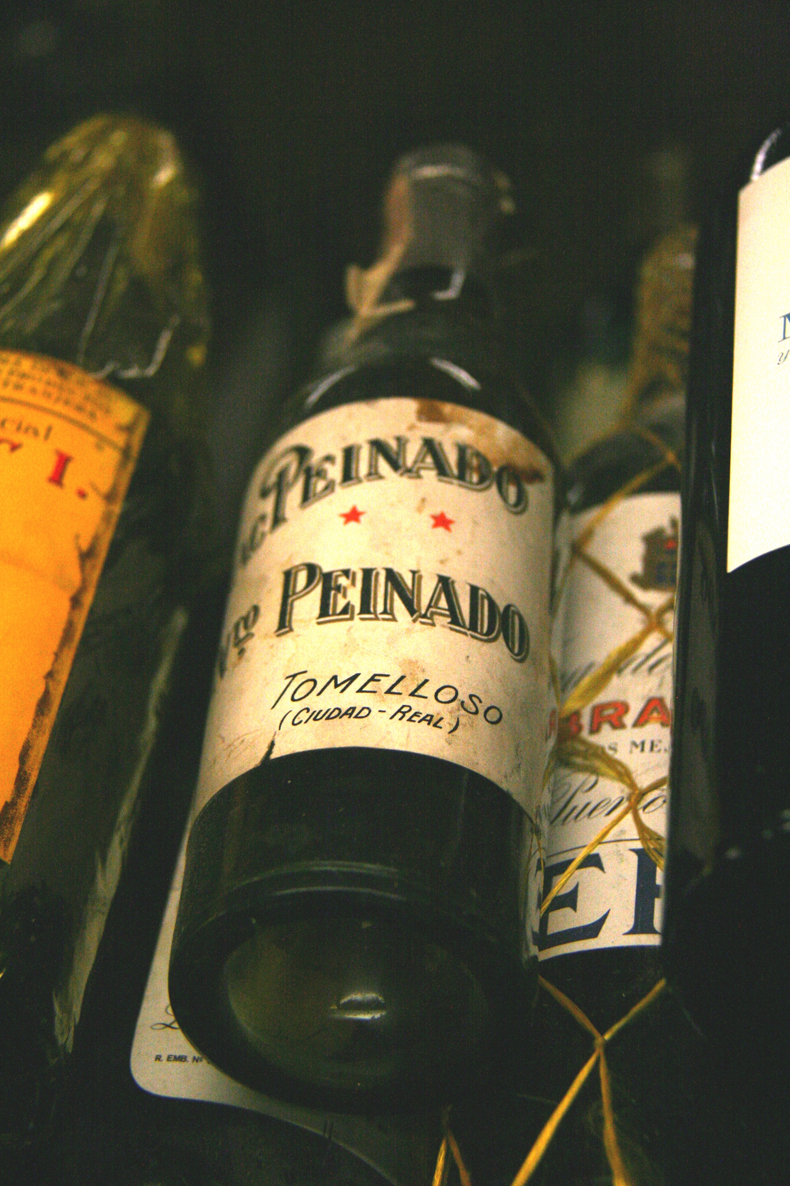 Antigua botella de Peinado